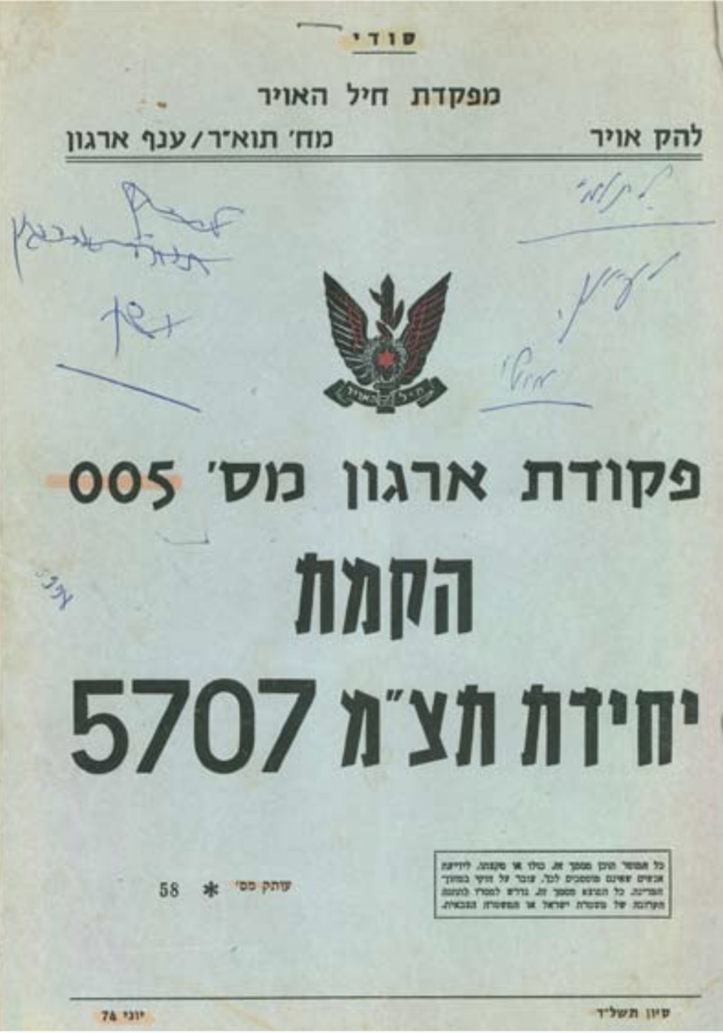 פקודת הקמת יחידת תצ״מ 5707